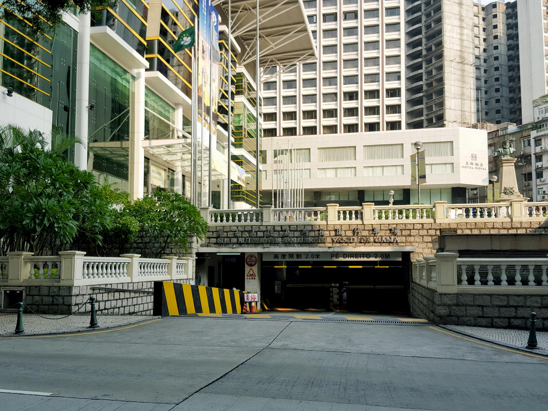 Jardim de Vasco da Gama